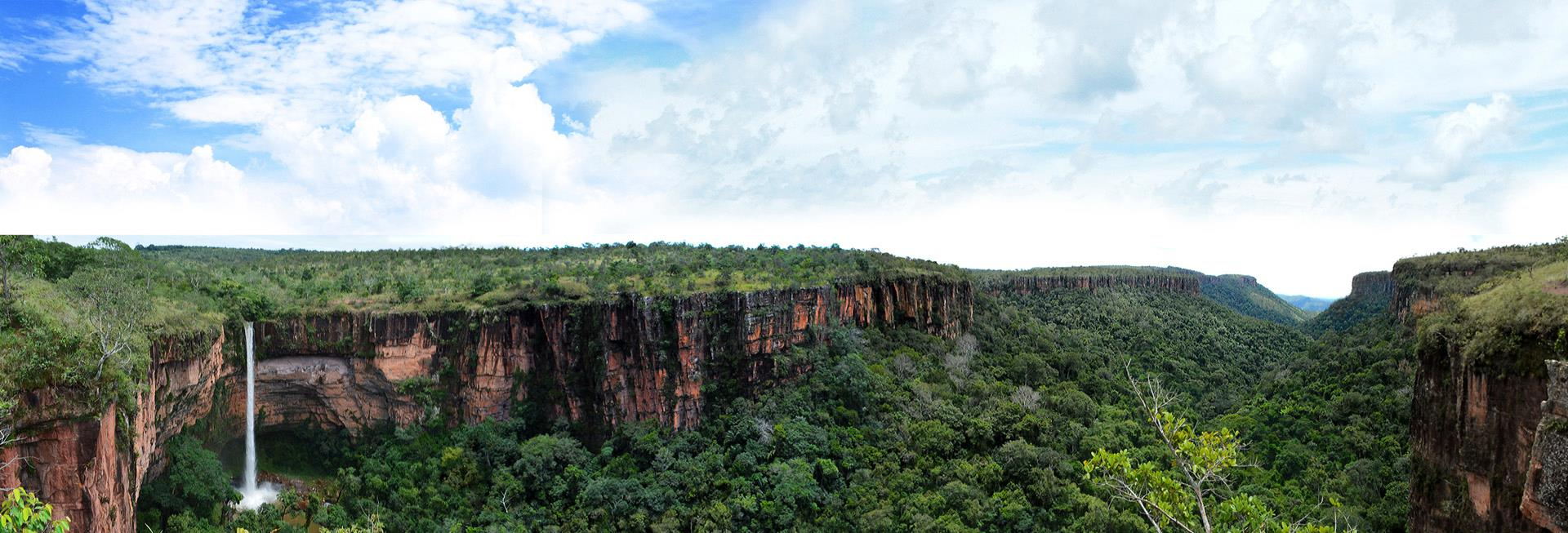 Foto panorôramica